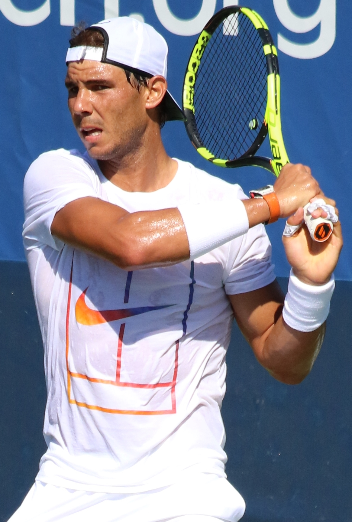 Nadal US16 (43)